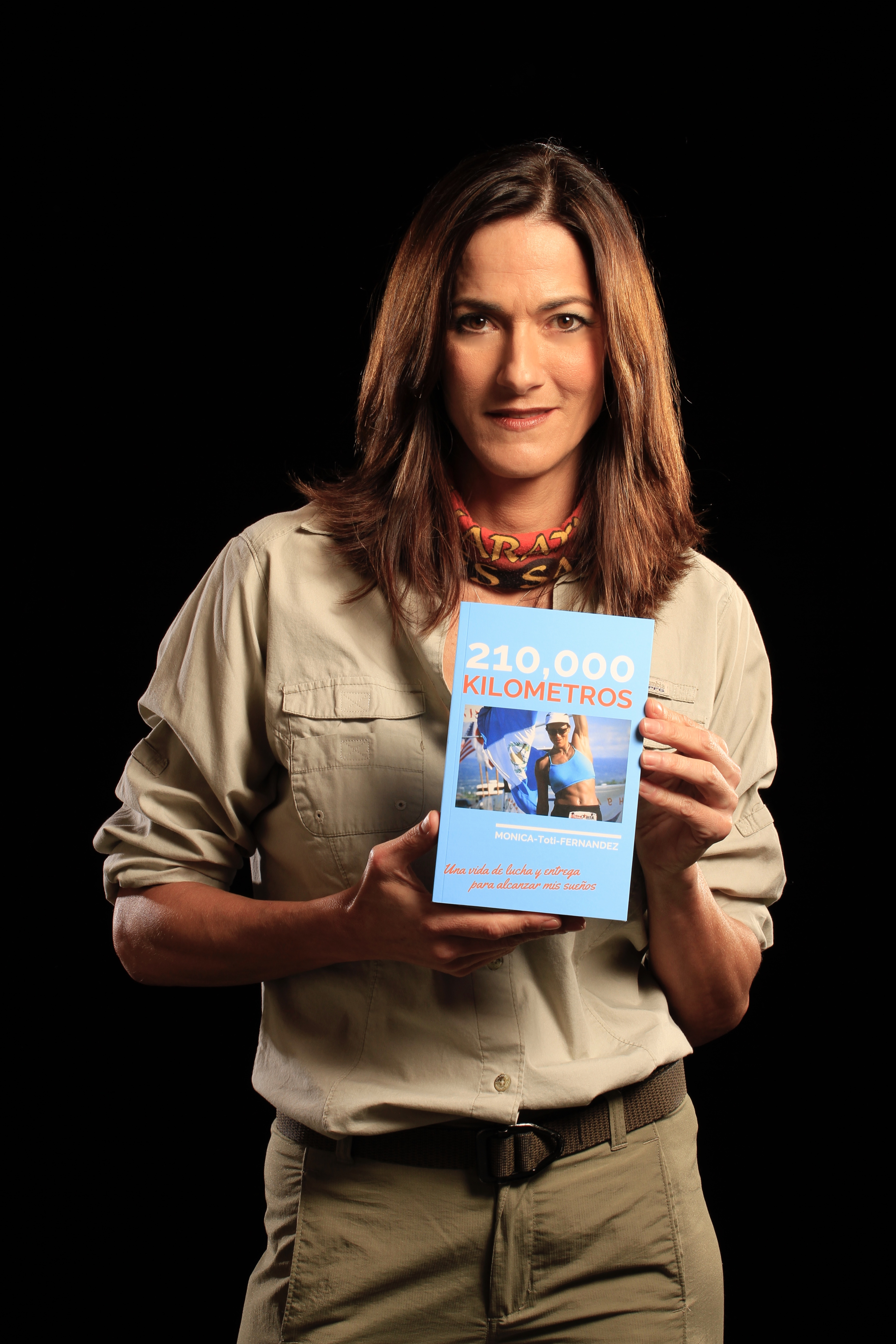 Emprendedora